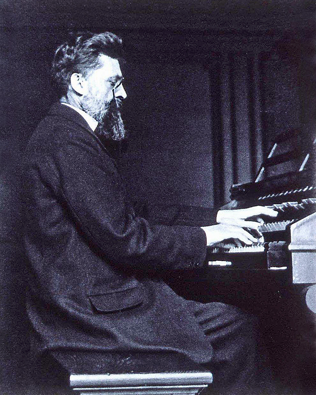 Ernest Munch. Bibliothèque nationale et universitaire de Strasbourg